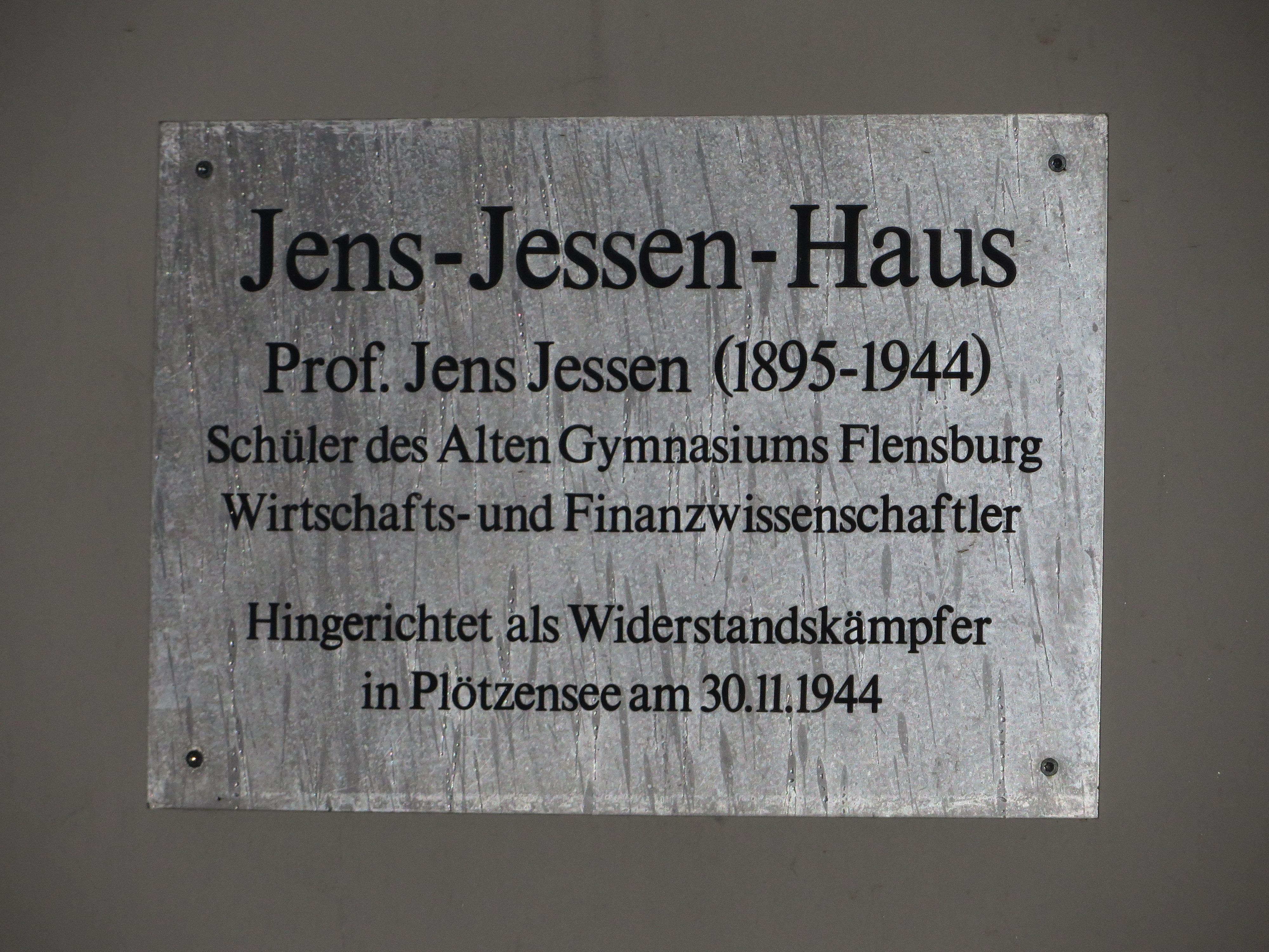 Gedenktafel für Jens Jessen, Bild 001